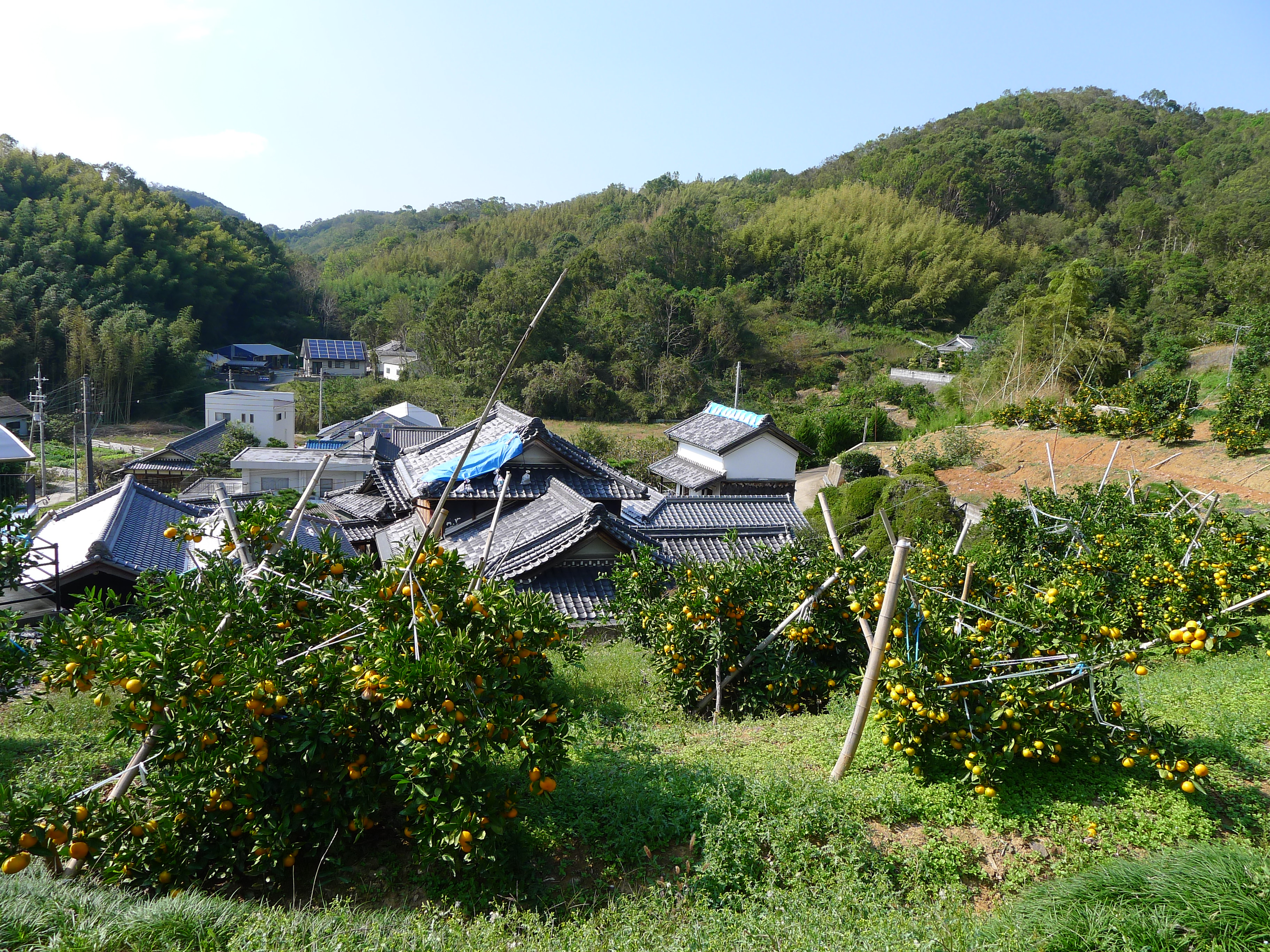 熊野古道紀伊路が通る塩ノ谷集落（和歌山県和歌山市）